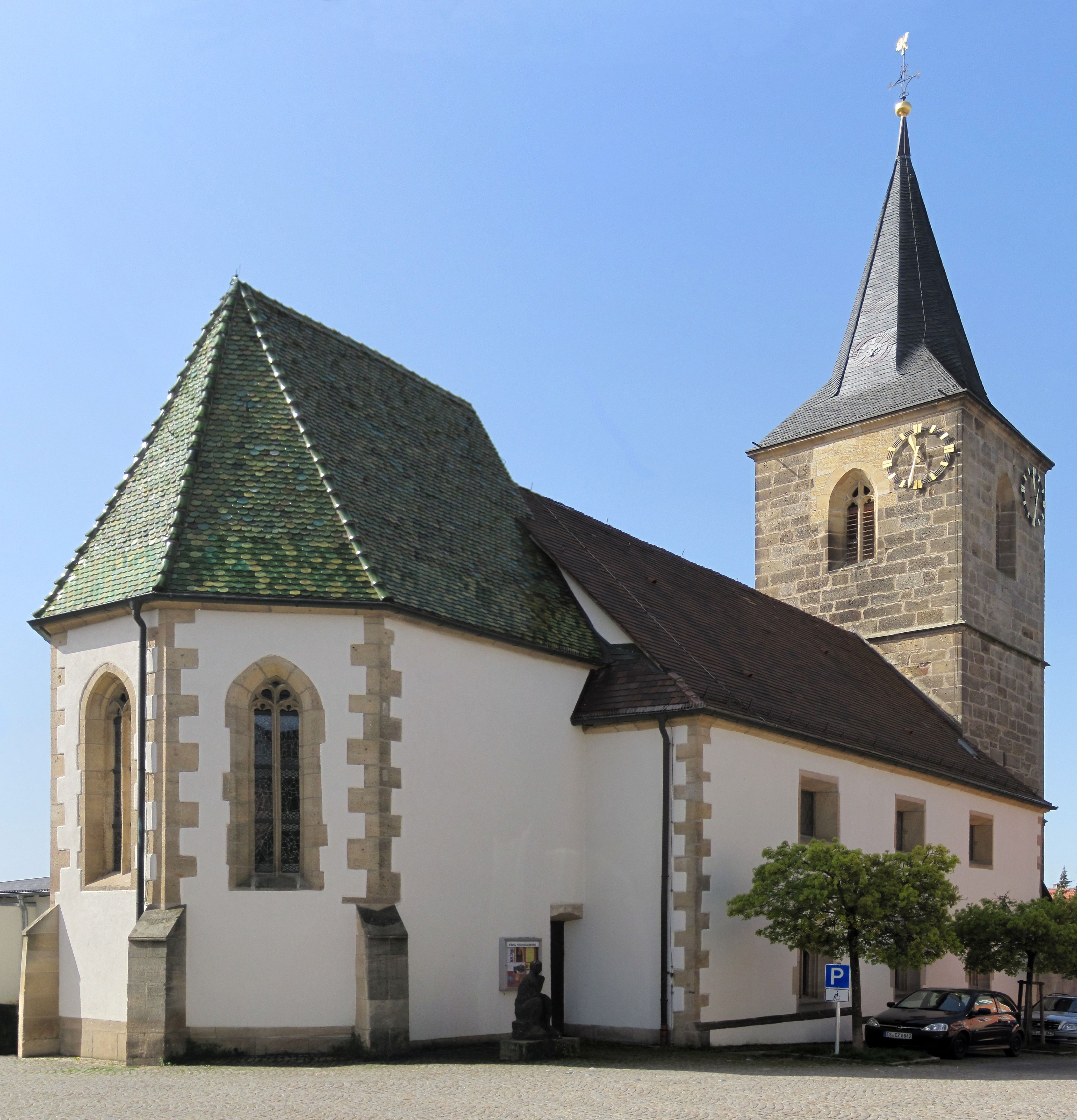 Georgskirche in Filderstadt-Bonlanden, Turm und Chor von 1472.